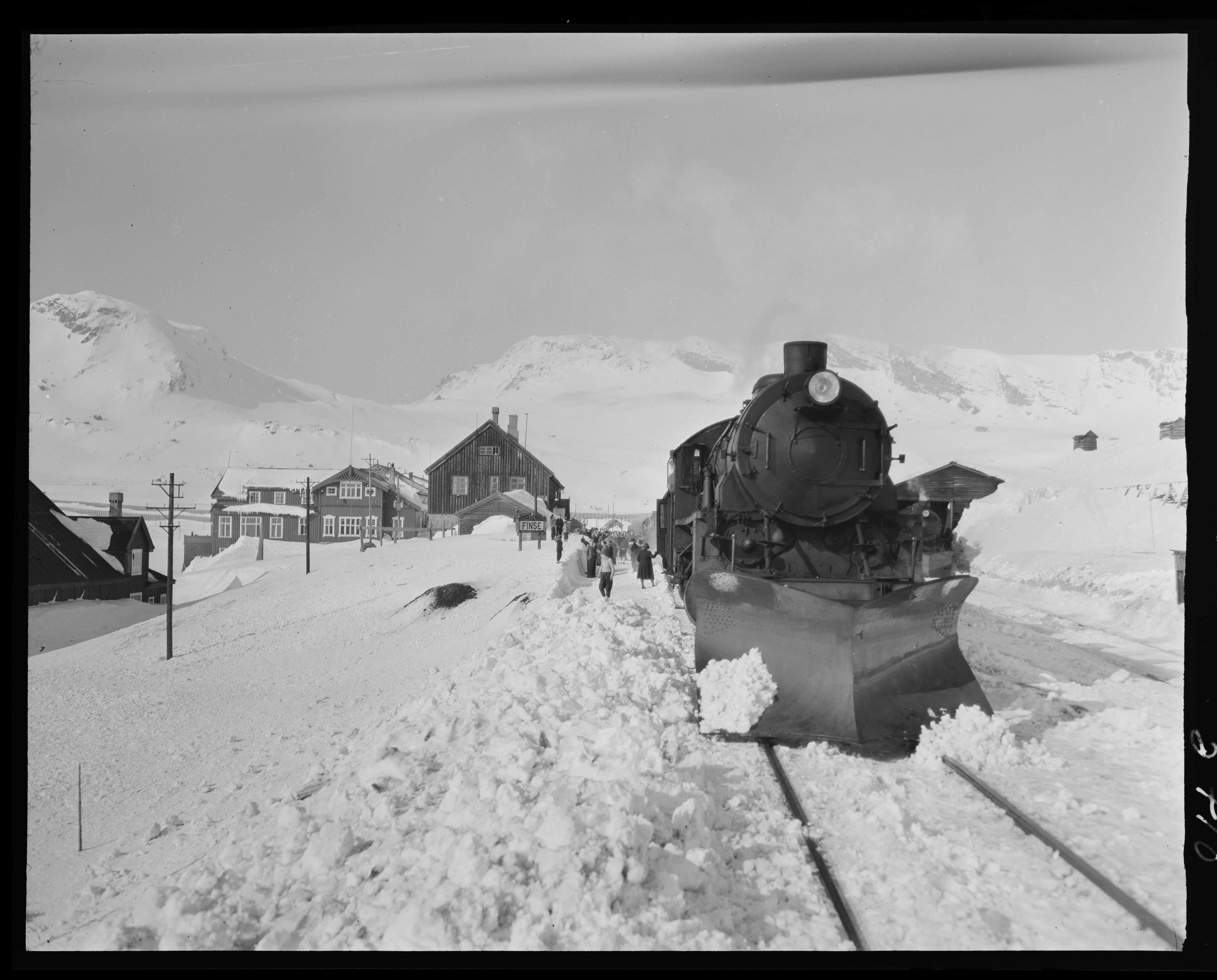 Bildet er hentet fra Nasjonalbibliotekets bildesamling. Anmerkninger til bildet var: fotograf :ukjent Finse, Ulvik, Hordaland